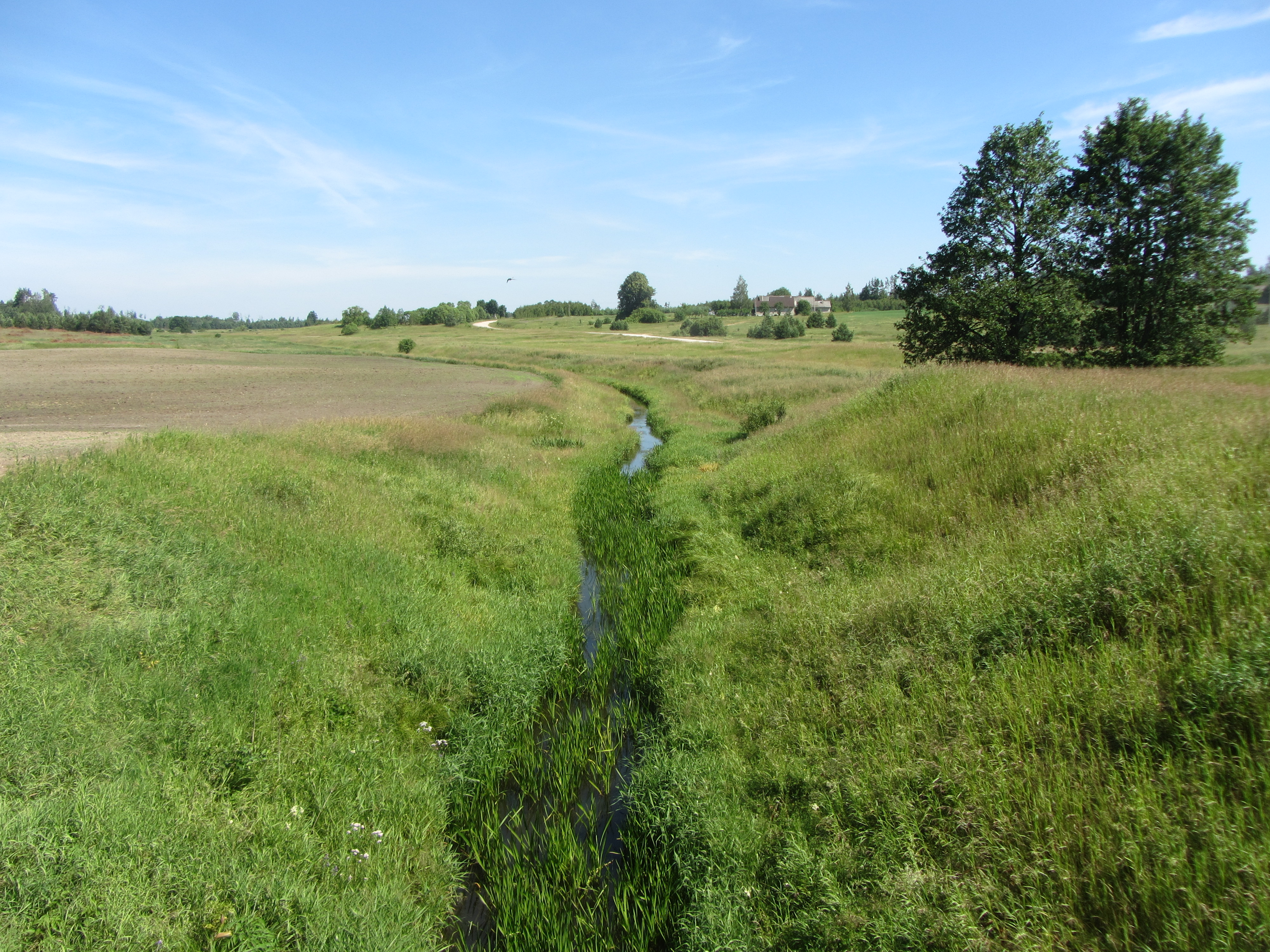 Meškučiai, Lithuania